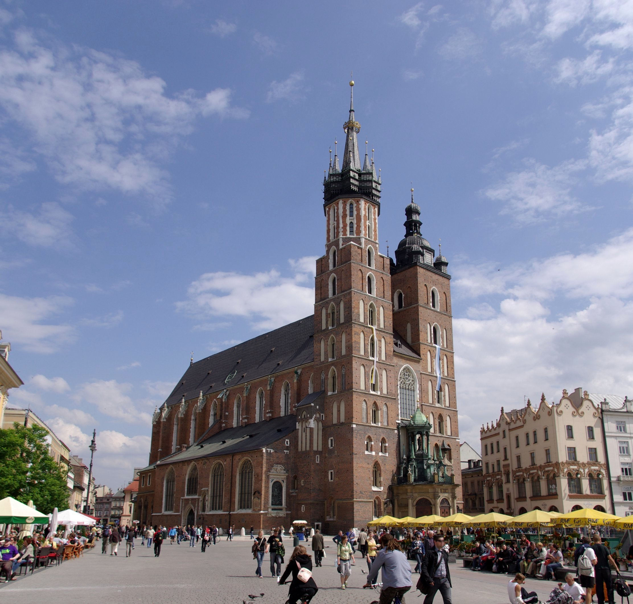 Kościół Mariacki w Krakowie